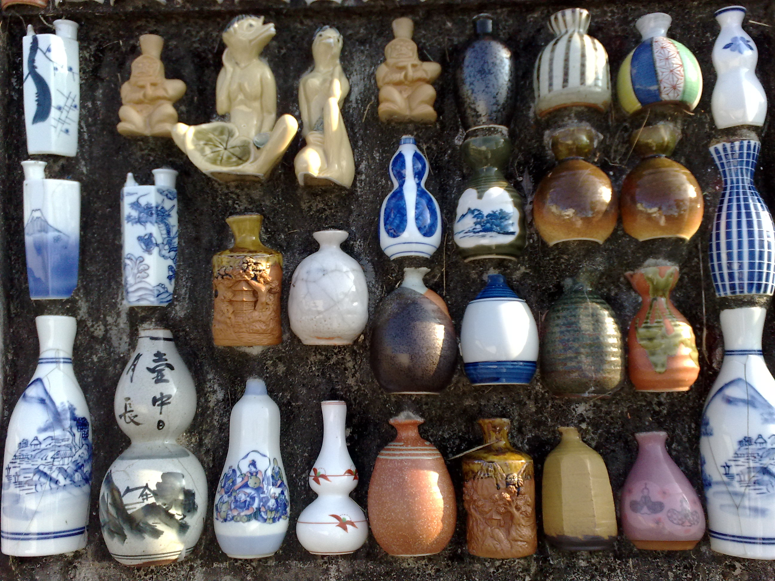 第１３回下石どえらあええ陶器祭り